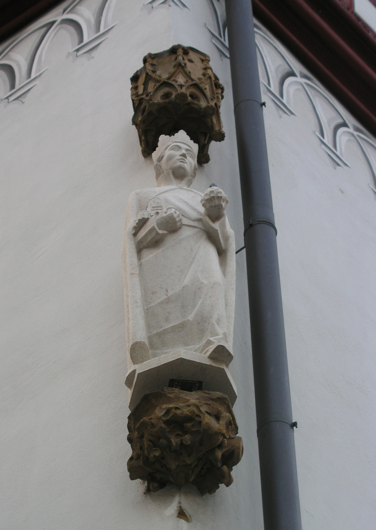 Standbild Friedrichs II. am Tanzhaus Nördlingen Germany